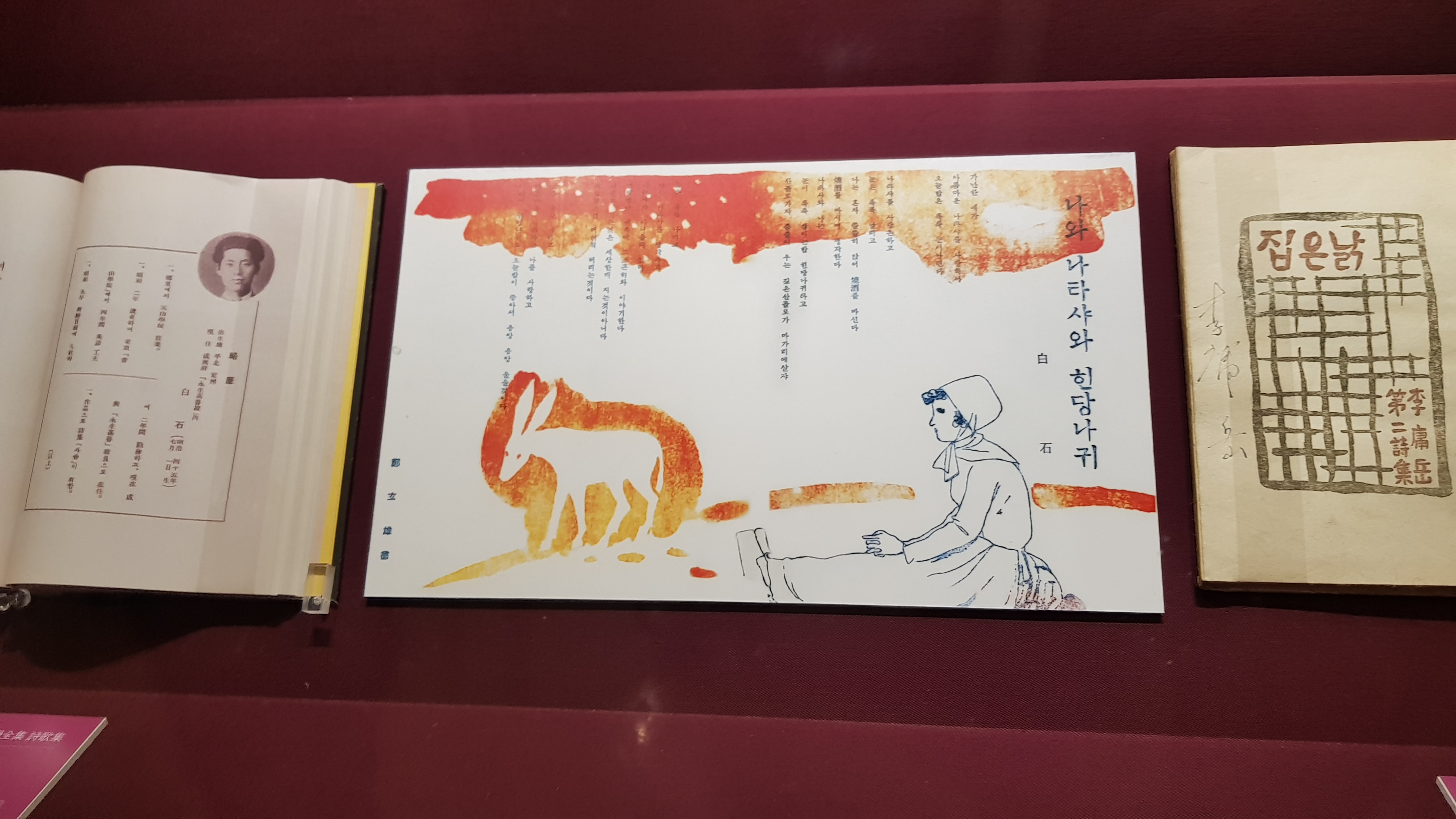 백석 시인 시집